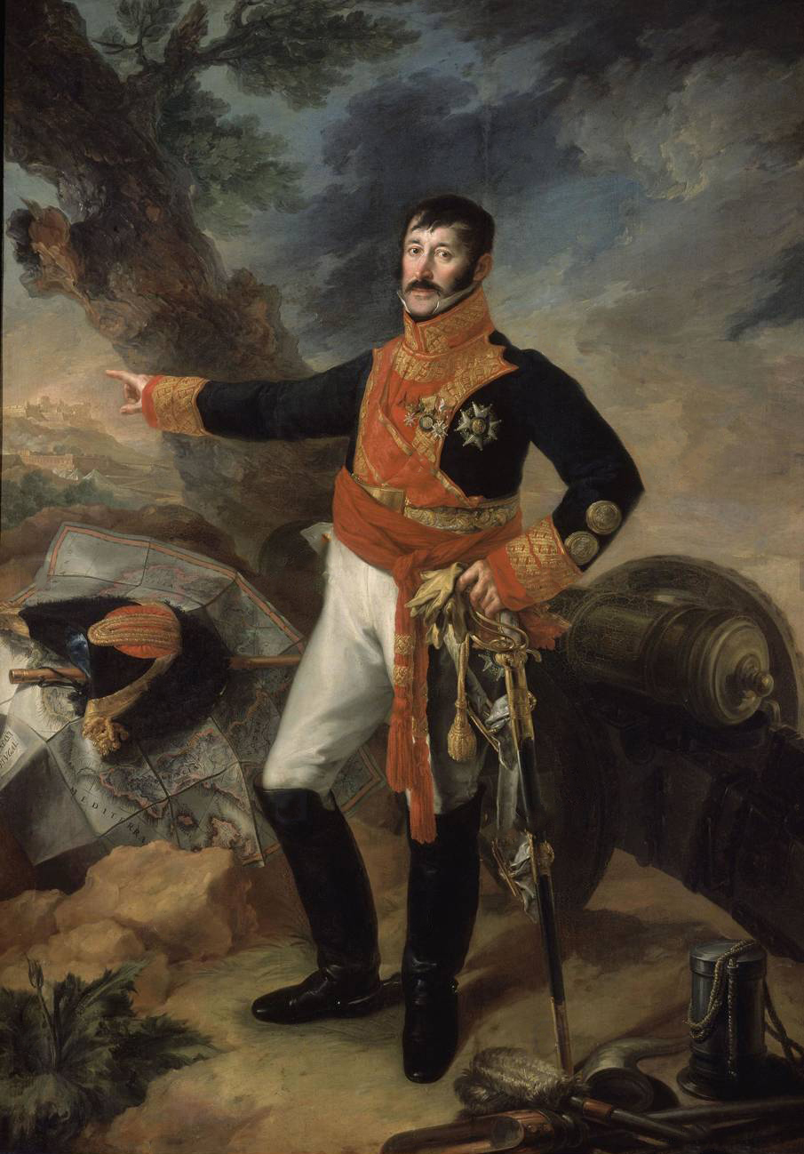 Retrato del militar español de origen cubano José Pascual de Zayas y Chacón (1772-1827), que llegó a ser general del ejército español.